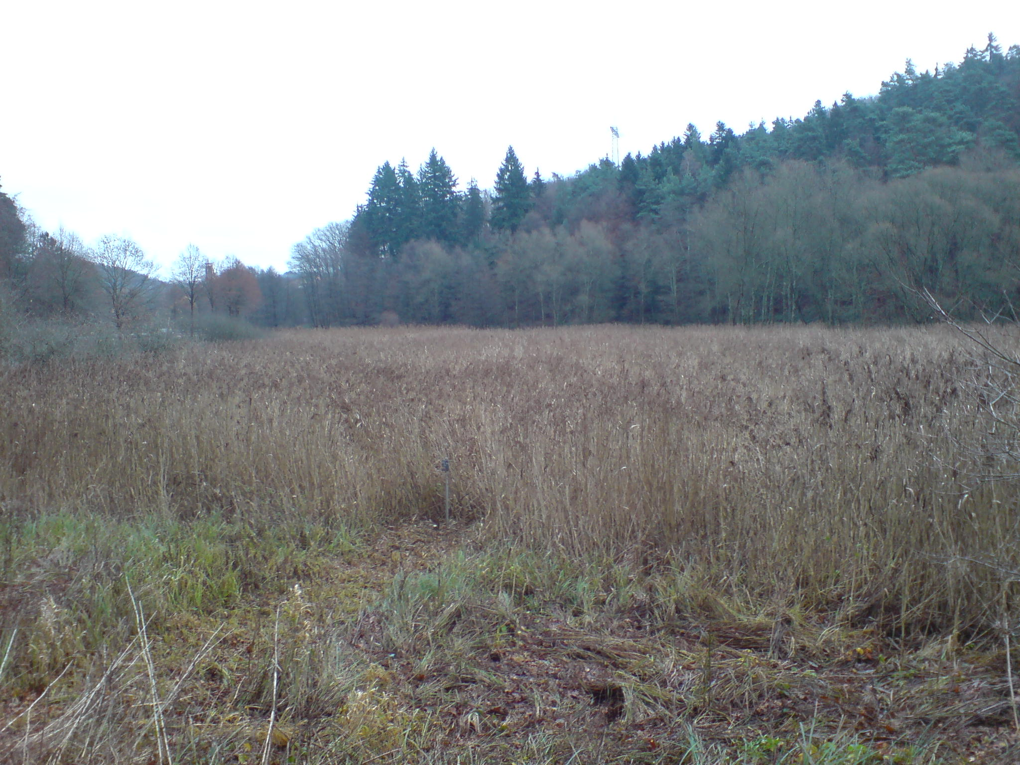 Schilfwiese im Lambsbachtal an der Emilienruhe